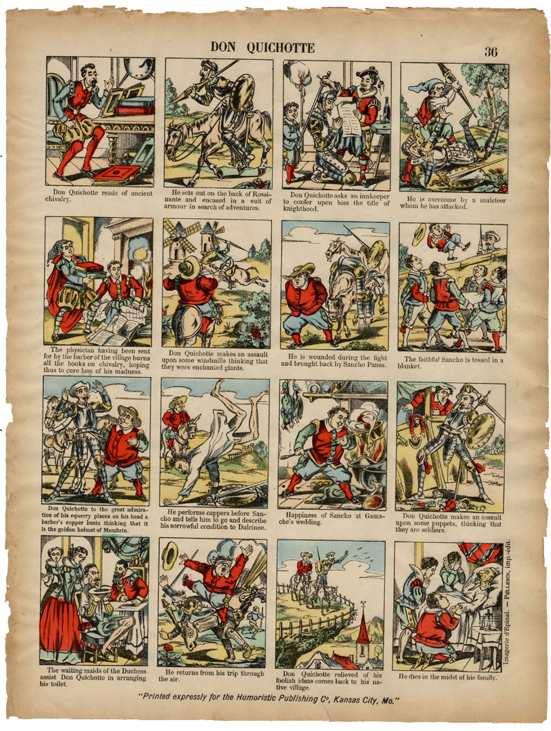 Imagerie d'Épinal, Don Quichotte ; Don Quixote